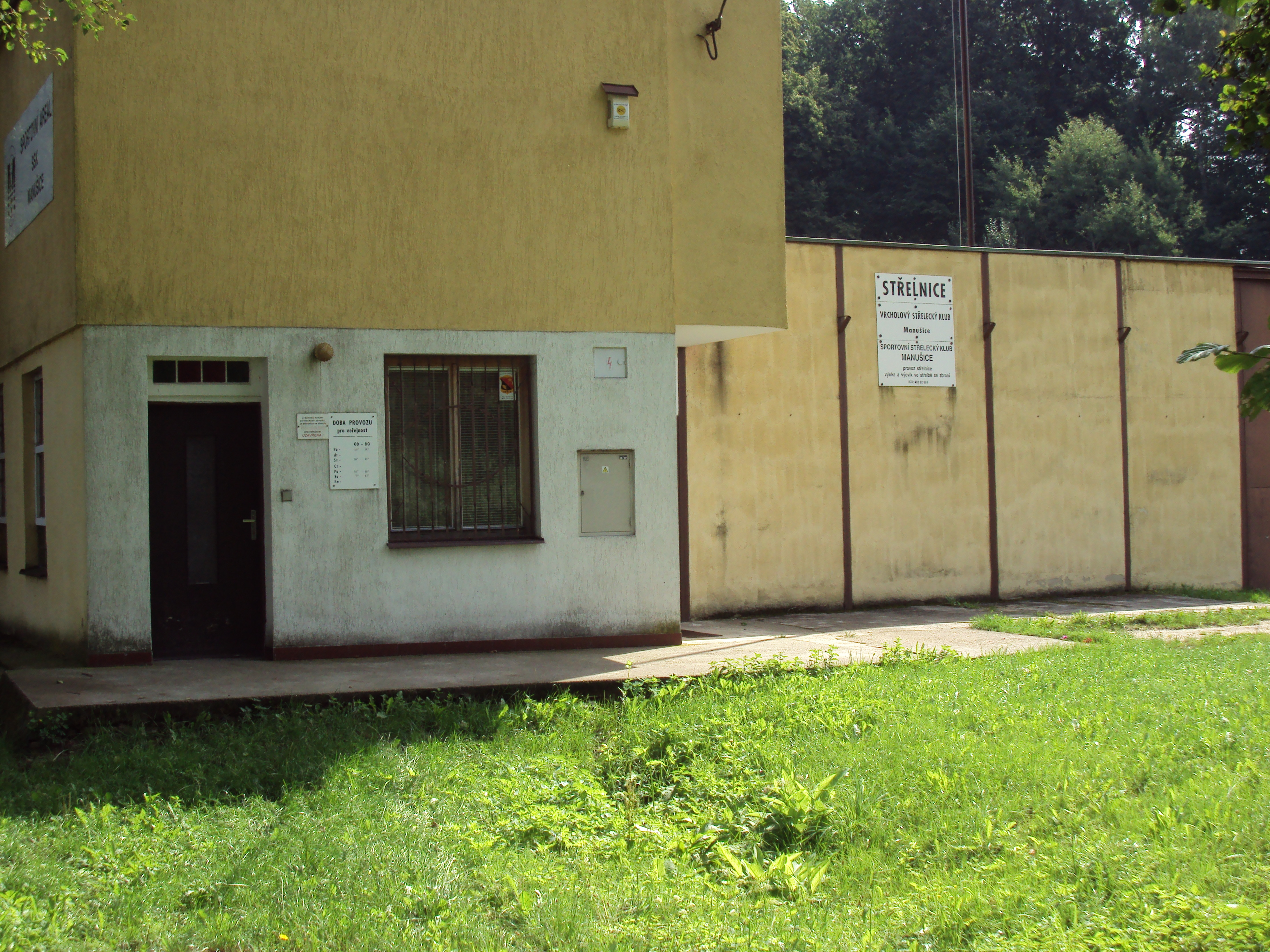 Objekt Střelnice v Manušicích